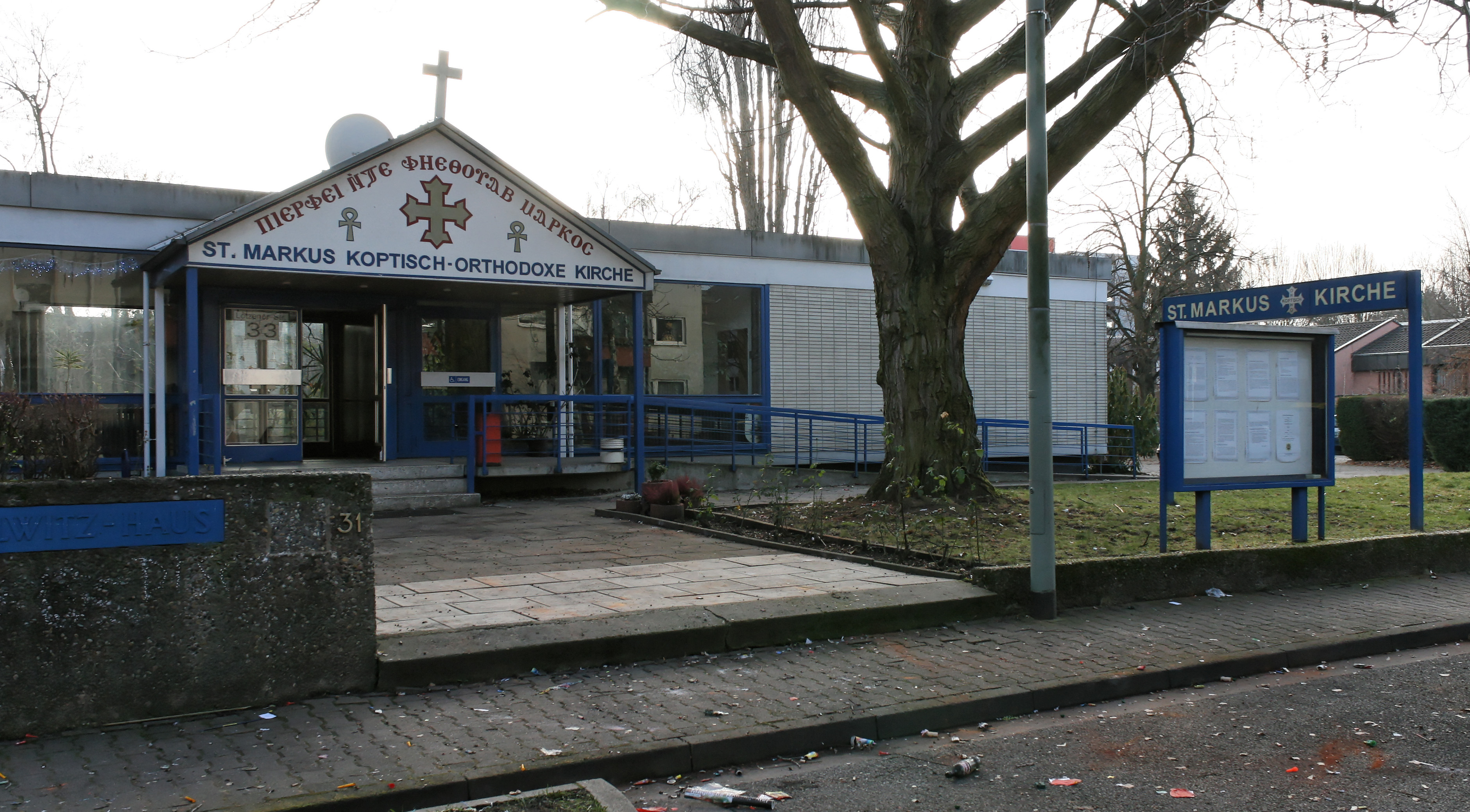 Koptisch-Orthodoxes Gemeindezentrum in Frankfurt am Main-Bockenheim, Lötzener Straße 33